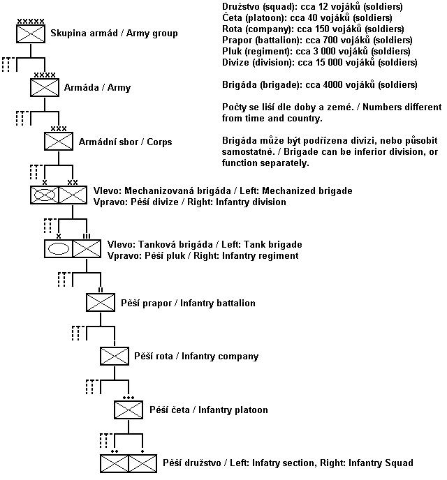 Typické dělení pozemní armády u většiny zemí světa.